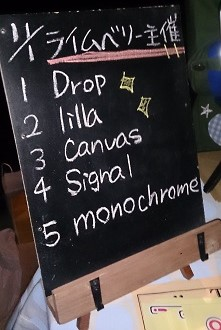 amiinaセトリボード(20151101(1))